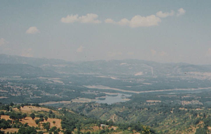 Lago del Pertusillo, presso Montemurro (provincia di Potenza)